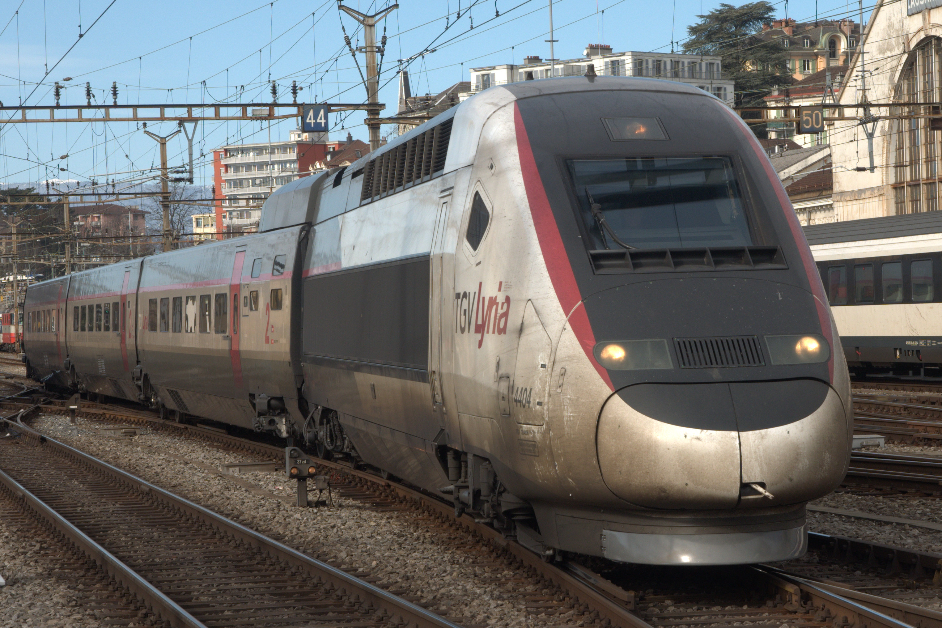 Lausanne 09.02.2015